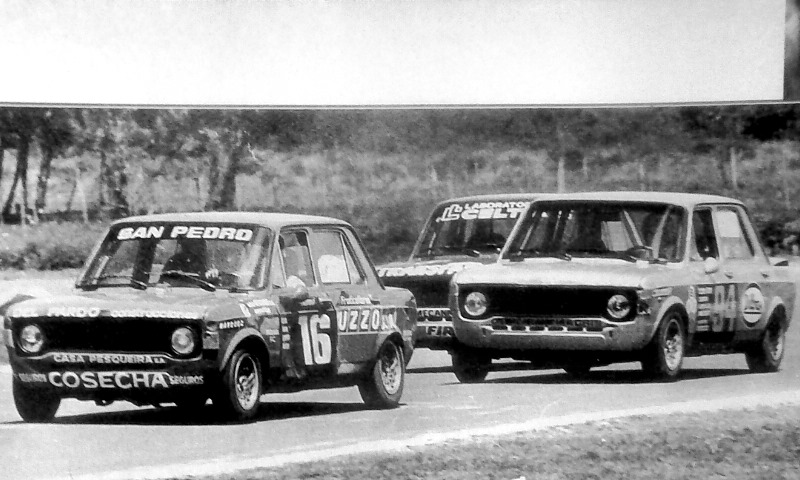 Osvaldo Morresi, Eduardo Mezza y Julio Pardo (Fiat 128 IAVA) Las Flores TN.